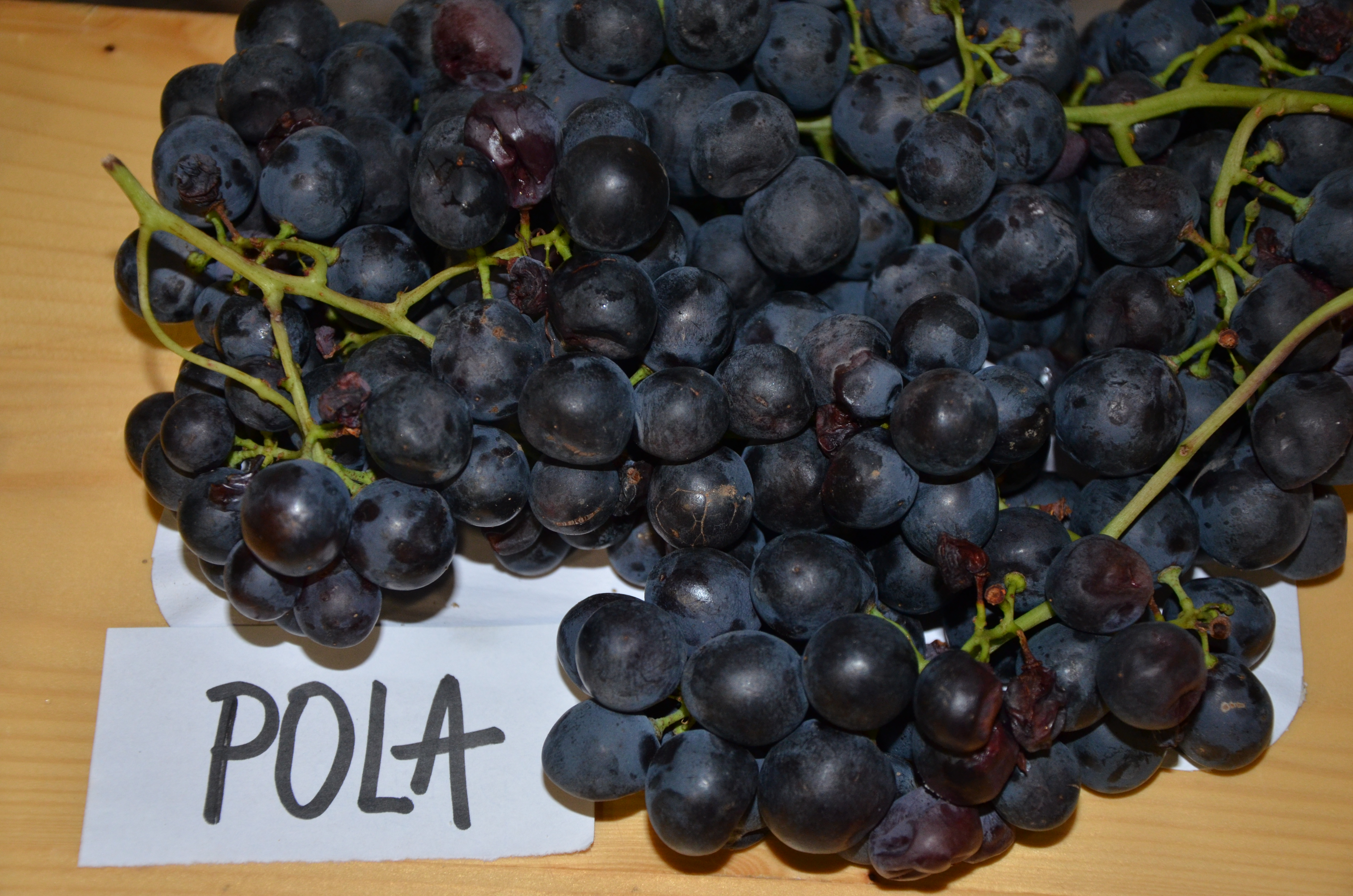 Hrozen a bobule odrůdy Pola.